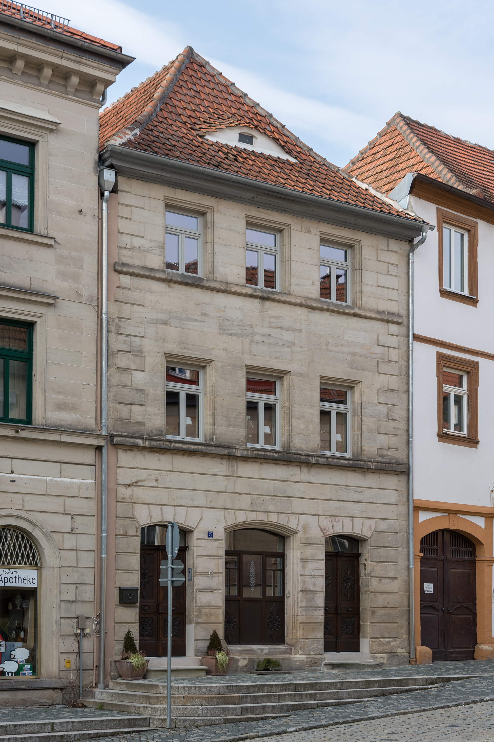 Gebäude Amtsgerichtsstraße 5 in Kronach.